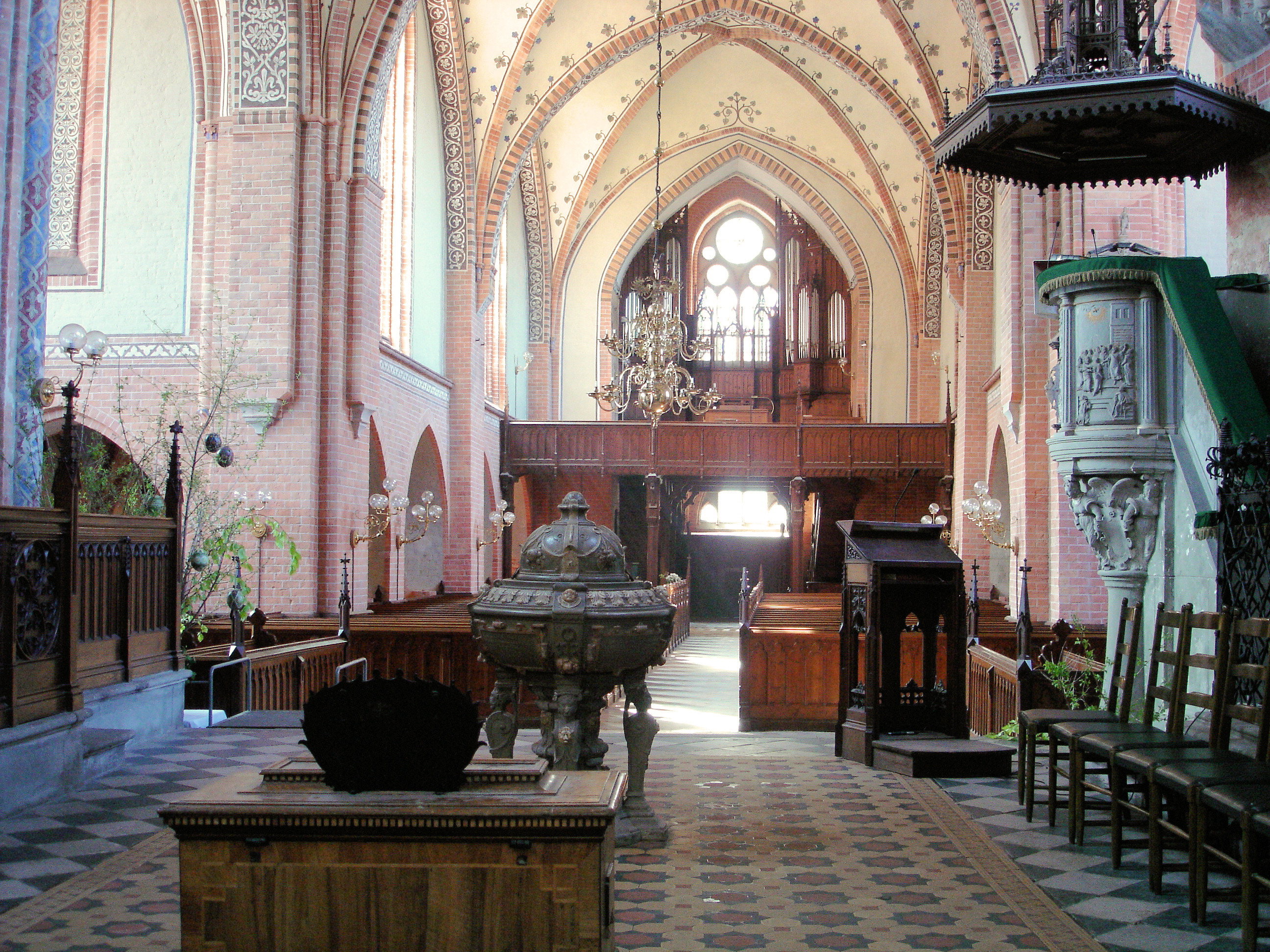 Langschiff und Orgelempore im Dom in Güstrow